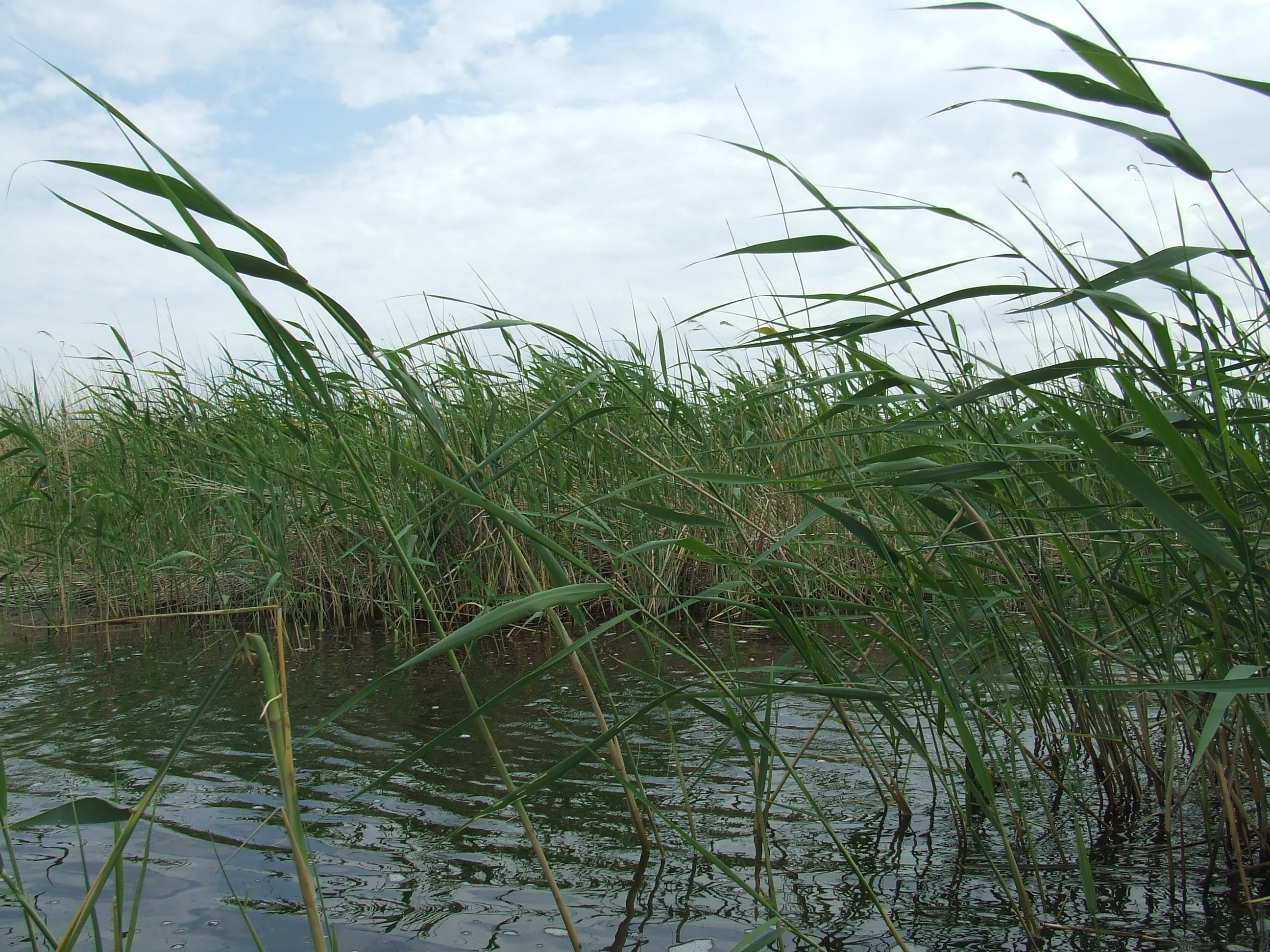 Азанколь в тростнике